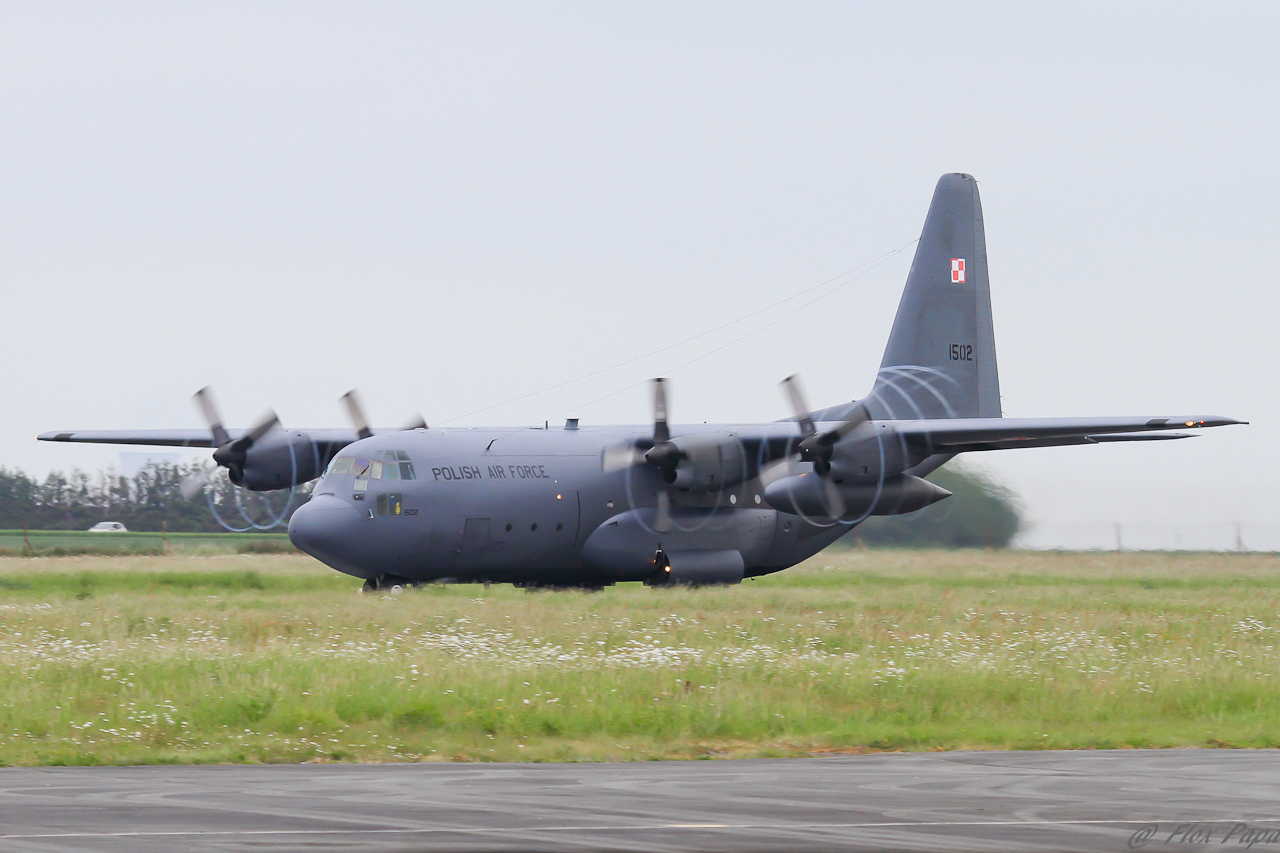 Cambrai 2011 Tiger Meet